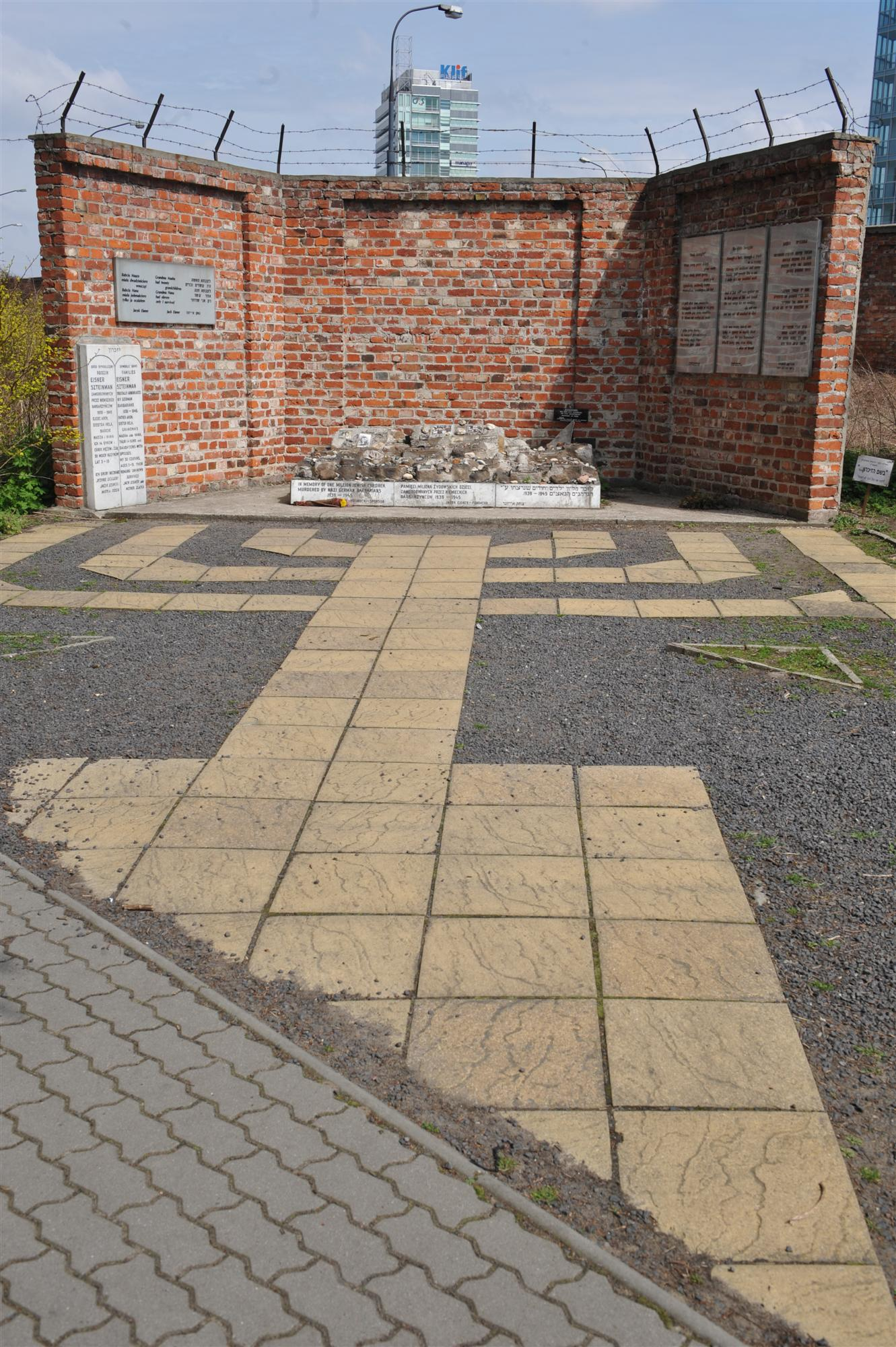 Pomnik Pamięci Dzieci – Ofiar Holokaustu